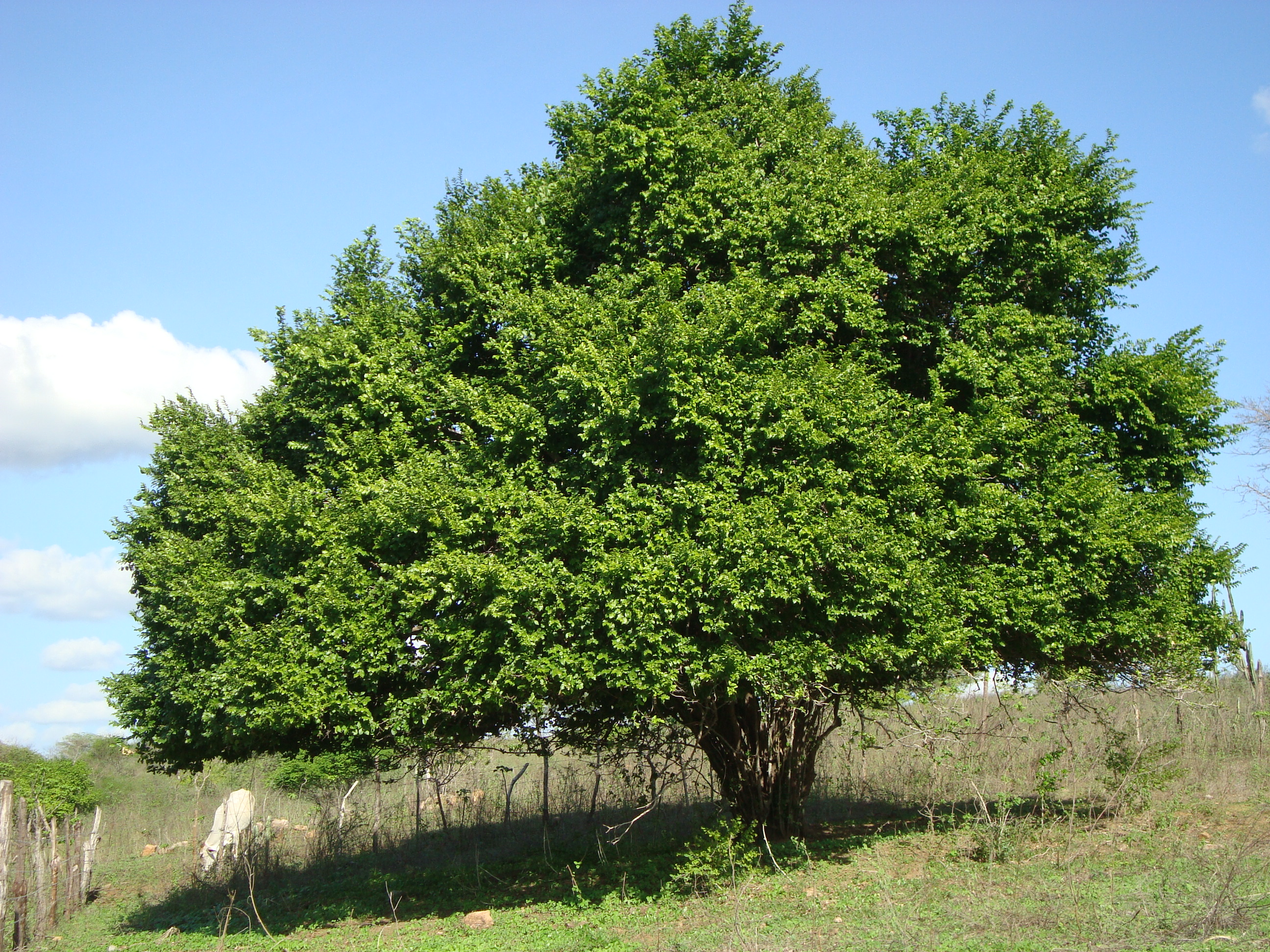 Juazeiro, árvore típica da região nordeste